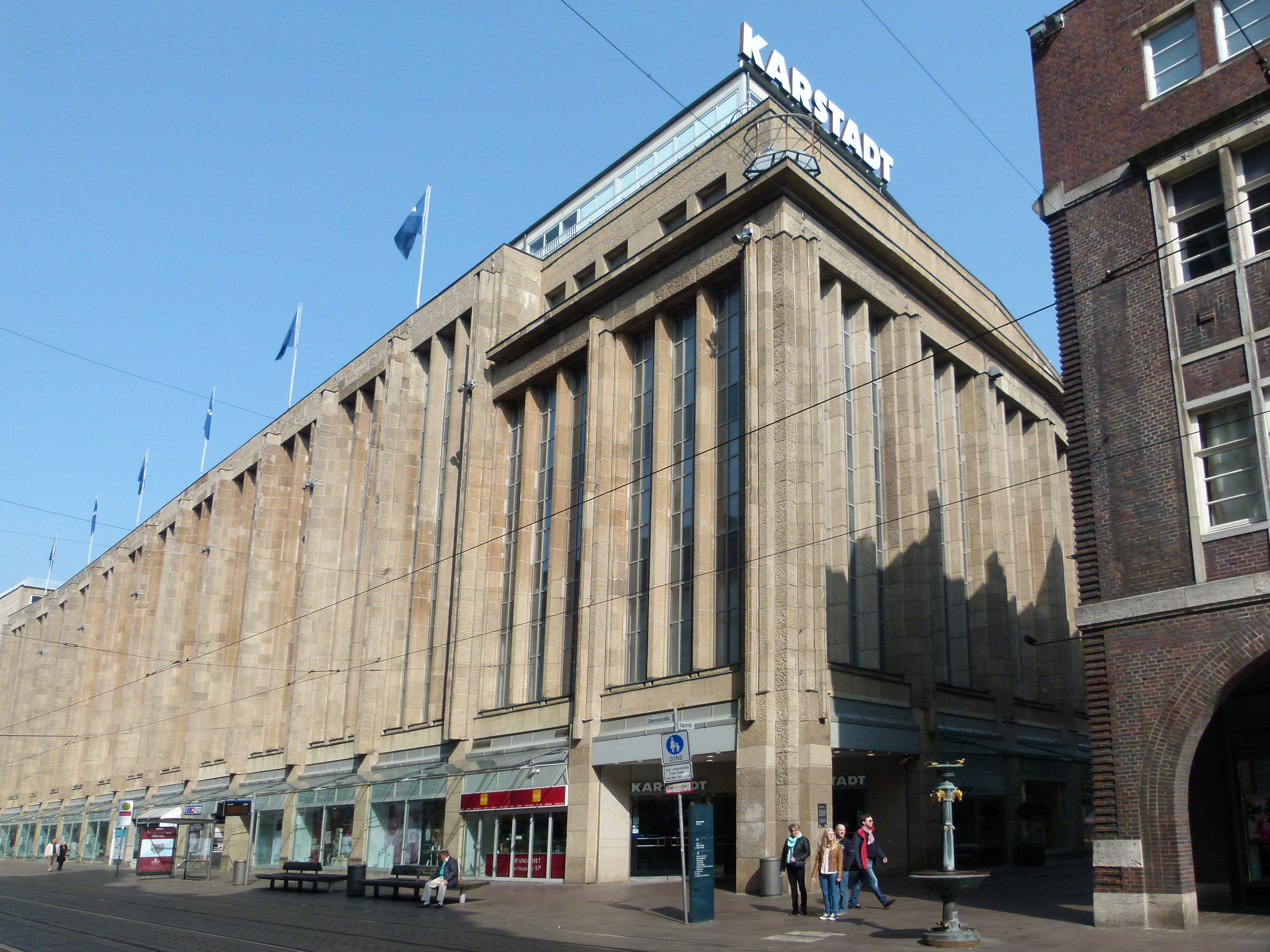 Handelshaus Karstadt in Bremen